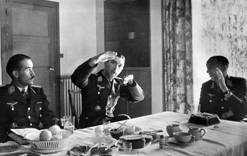 Geburtstag Theo Osterkamp, Gäste Lw.K.B. (mot.) 3 - Archiv-Nr. 976/29 Bildberichter Sdf. Dreesen, 3. KB.Zug Text: Das OKW meldete: "Oberstleutnant Mölders errang am 16. April seinen 64. und 65., Oberstleutnant Galland am 15. April seinen 59., und 60. Luftsieg" - Hier schildert Oberstleutnant Mölders in Gegenwart von Generalmajor Osterkamp und Oberstleutnant Galland den Verlauf seines letzten Luftkampfes. Fot. Scherl [Empfang zum 49. Geburtstag (15.4.1892) von Theodor Osterkamp.- vlnr: Adolf Galland, Werner Mölders, Theodor Osterkamp] Abgebildete Personen: Galland, Adolf: Generalmajor, Inspekteur der Jagdflieger, Ritterkreuz (RK), Luftwaffe, Deutschland (GND 11853727X) Mölders, Werner: Oberst, Ritterkreuz (RK), Luftwaffe, Deutschland (GND 11858300X) Osterkamp, Theodor: Generalmajor, Ritterkreuz (RK), Luftwaffe, Orden Pour le mérite, Deutschland (GND 124745822)